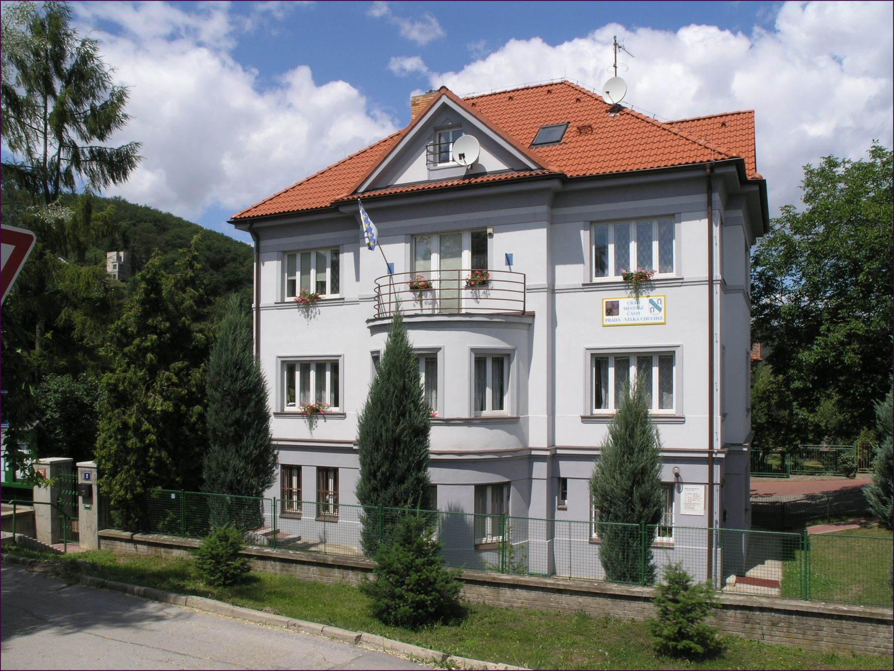 Praha, Velká Chuchle, U skály 262/2 - Úřad městské části